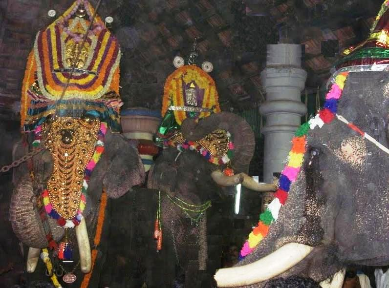 നാല്പത്തെണ്ണീശ്വരം ഉത്സവം-വിടവാങ്ങൽ